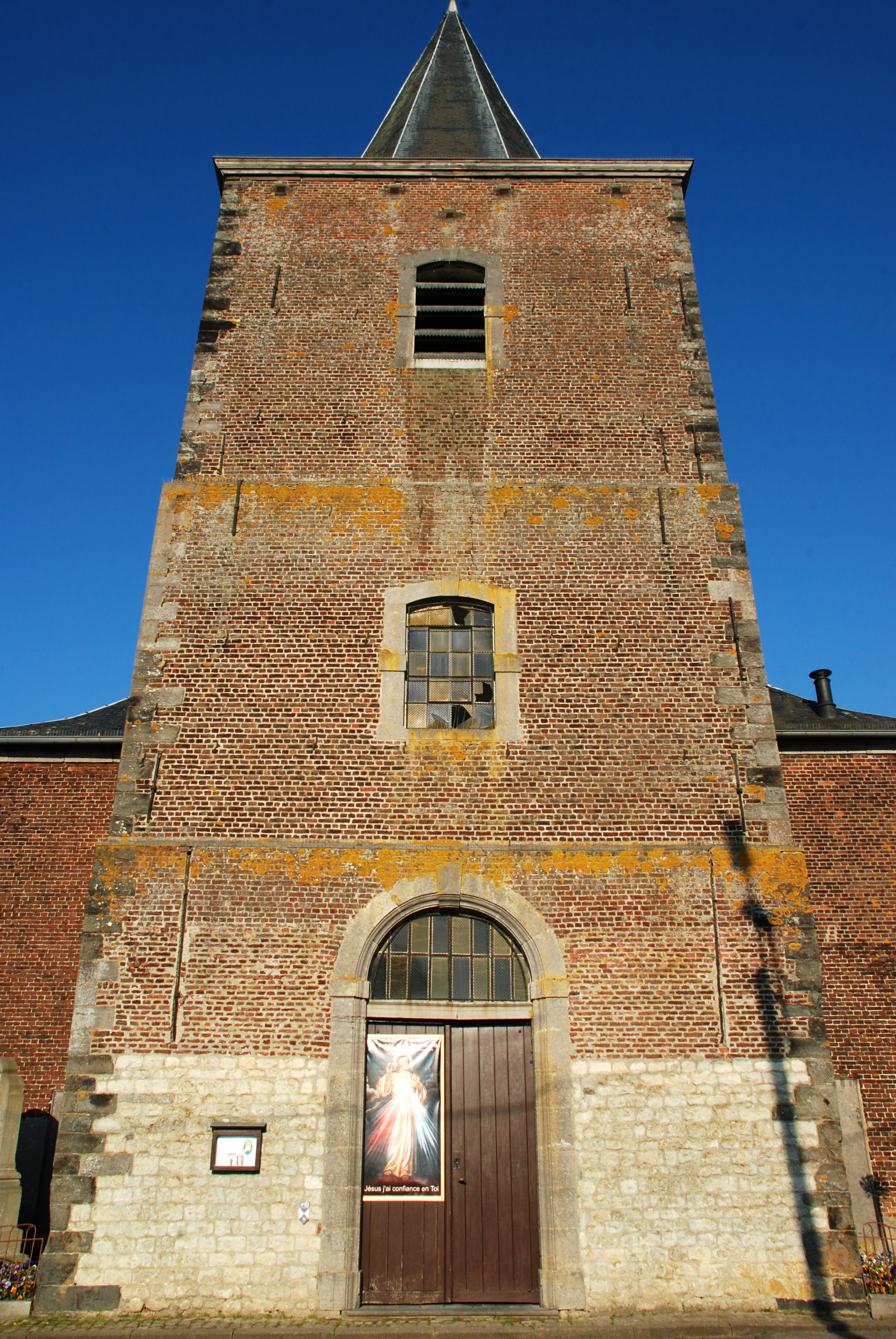 Belgique - Brabant wallon - Église Saint-Martin de Ways